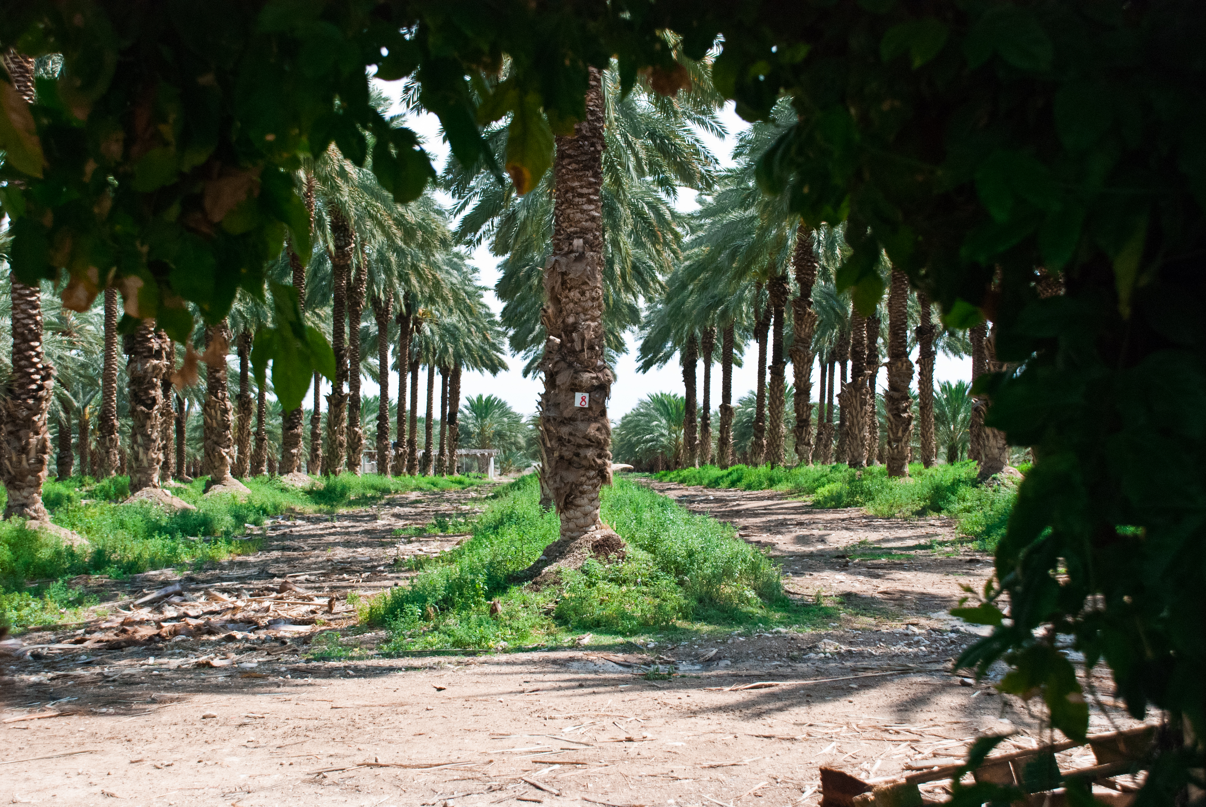 Naaran